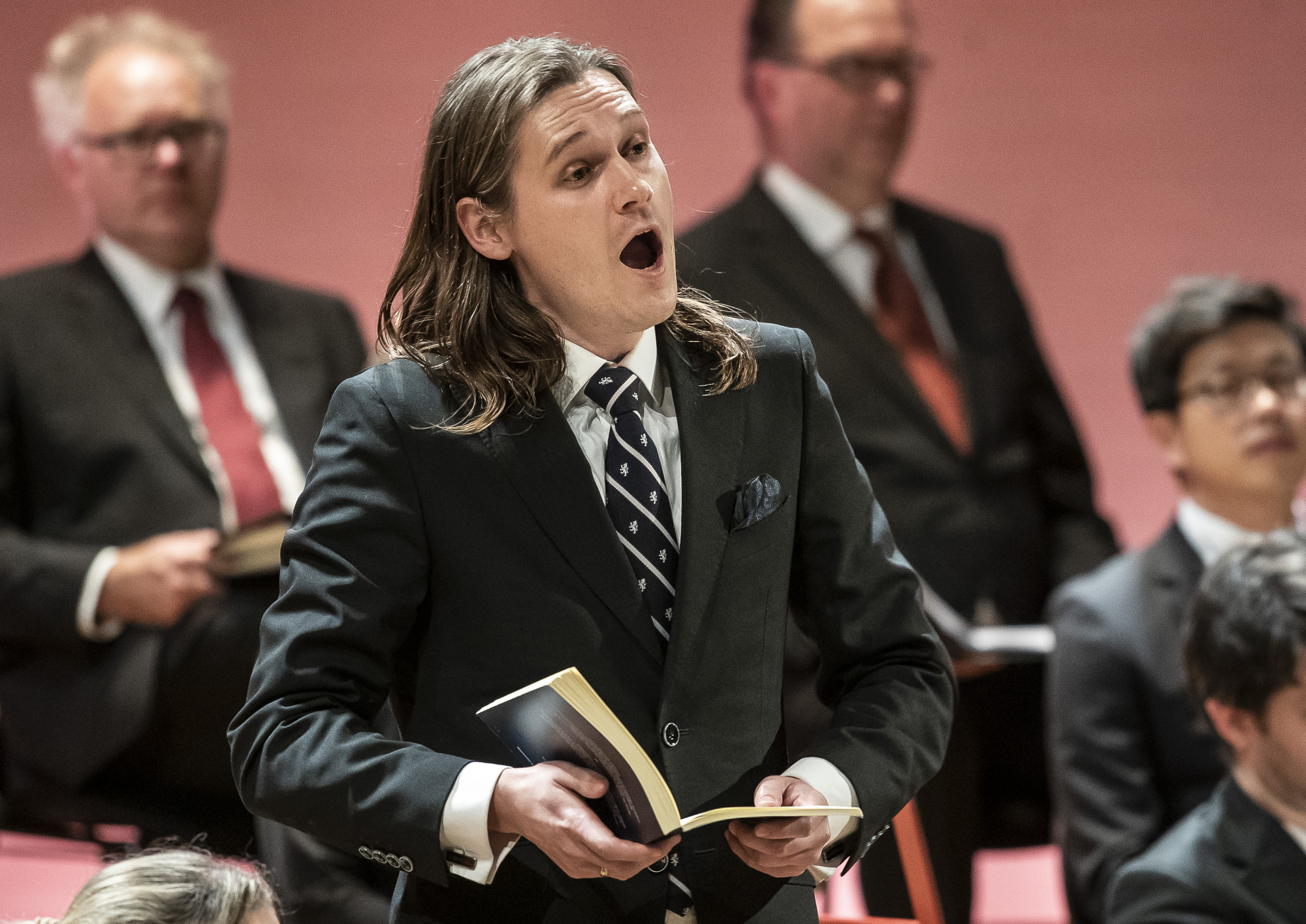 Benedikt Kristjánsson, J.S. Bach Weihnachts-Oratorium BWV 248, Praha, Rudolfinum, Collegium 1704, Peter Dijkstra dirigent, sólisté Hannah Morrison soprán, Maarten Engeltjes kontratenor, Benedikt Kristjansson tenor, Tobias Berndt bas